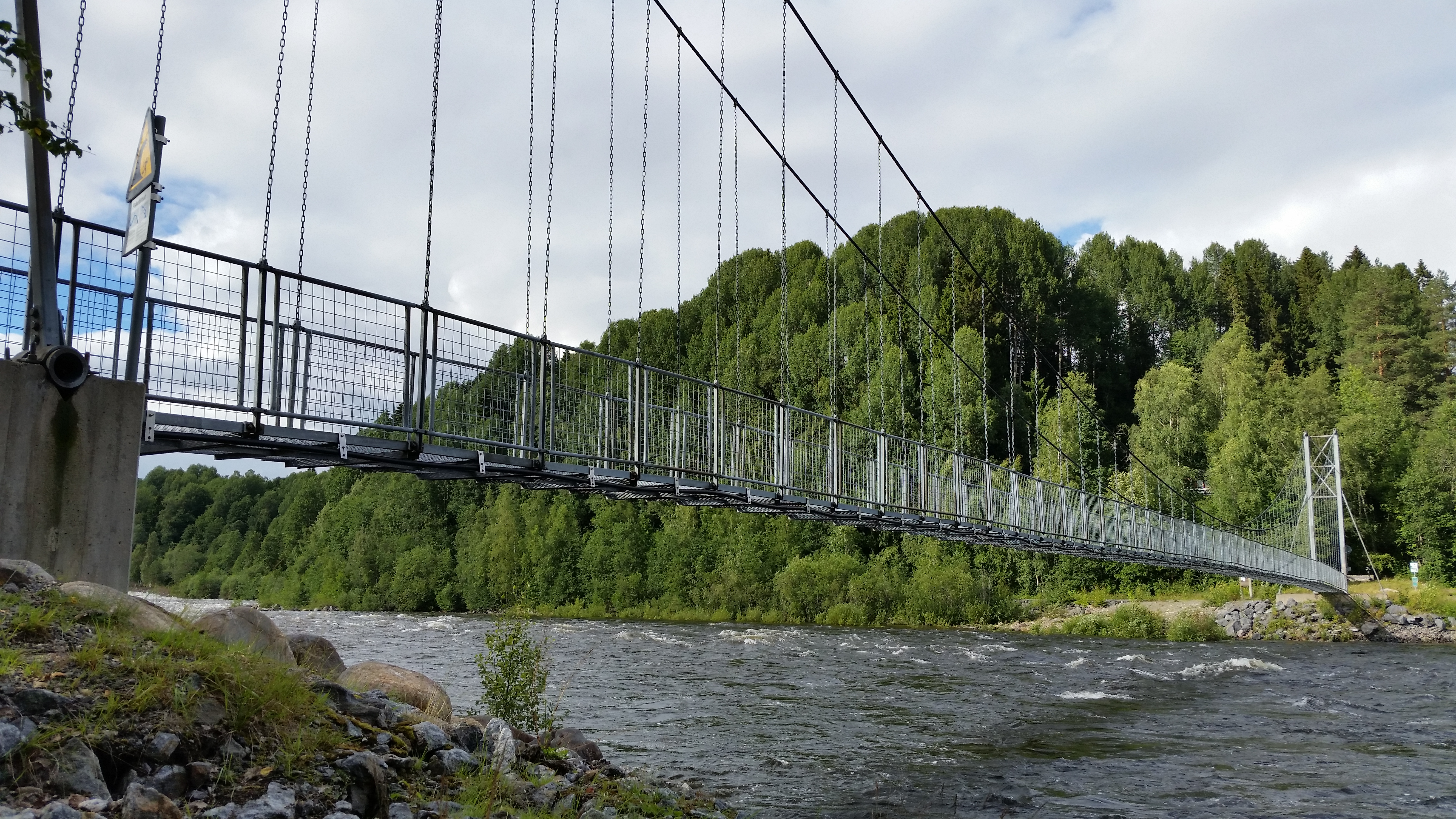 Notvarpsbron är en hängbro som går över Umeälven. Den förbinder Baggböle / Arboretum Norr på älvens norra sida med Umeå Energicentrum, nära Klabböle, på den södra sidan